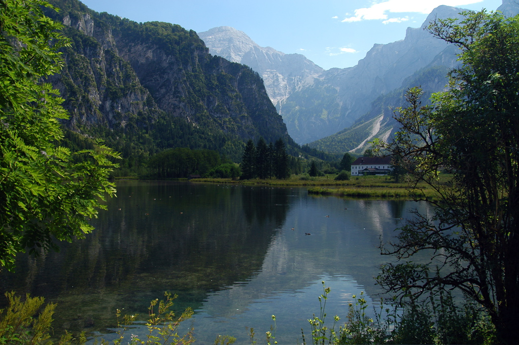 Blick auf das Südufer des malerischen Almsees, Salzkammergut, Oberösterreich